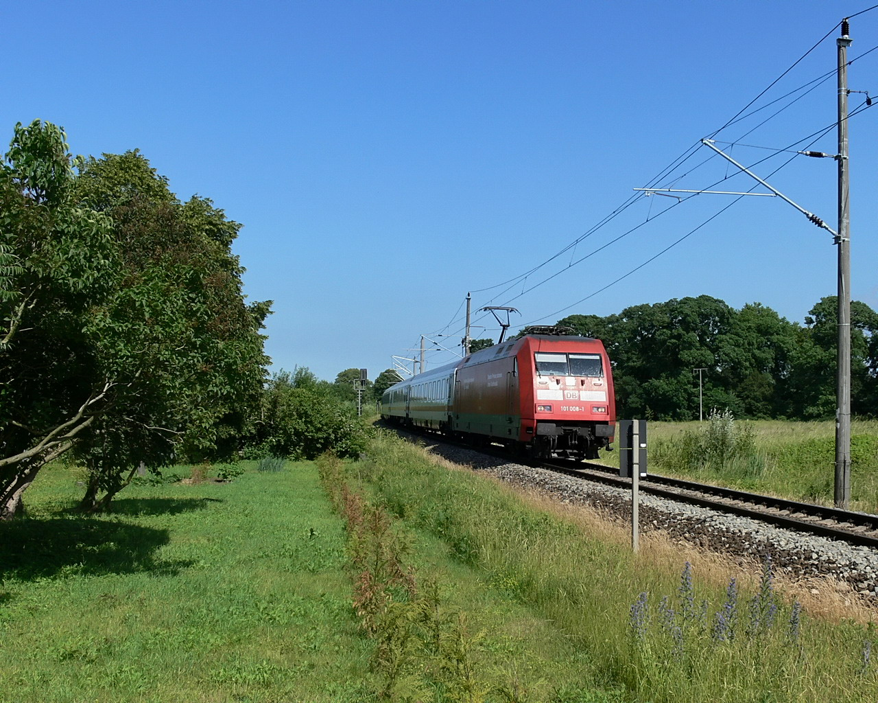 Ein IC zwischen Velgast und Ribnitz am Bahnübergang in Behrenshagen. A IC between Velgast and Ribnitz at a level crossing in Behrenshagen.